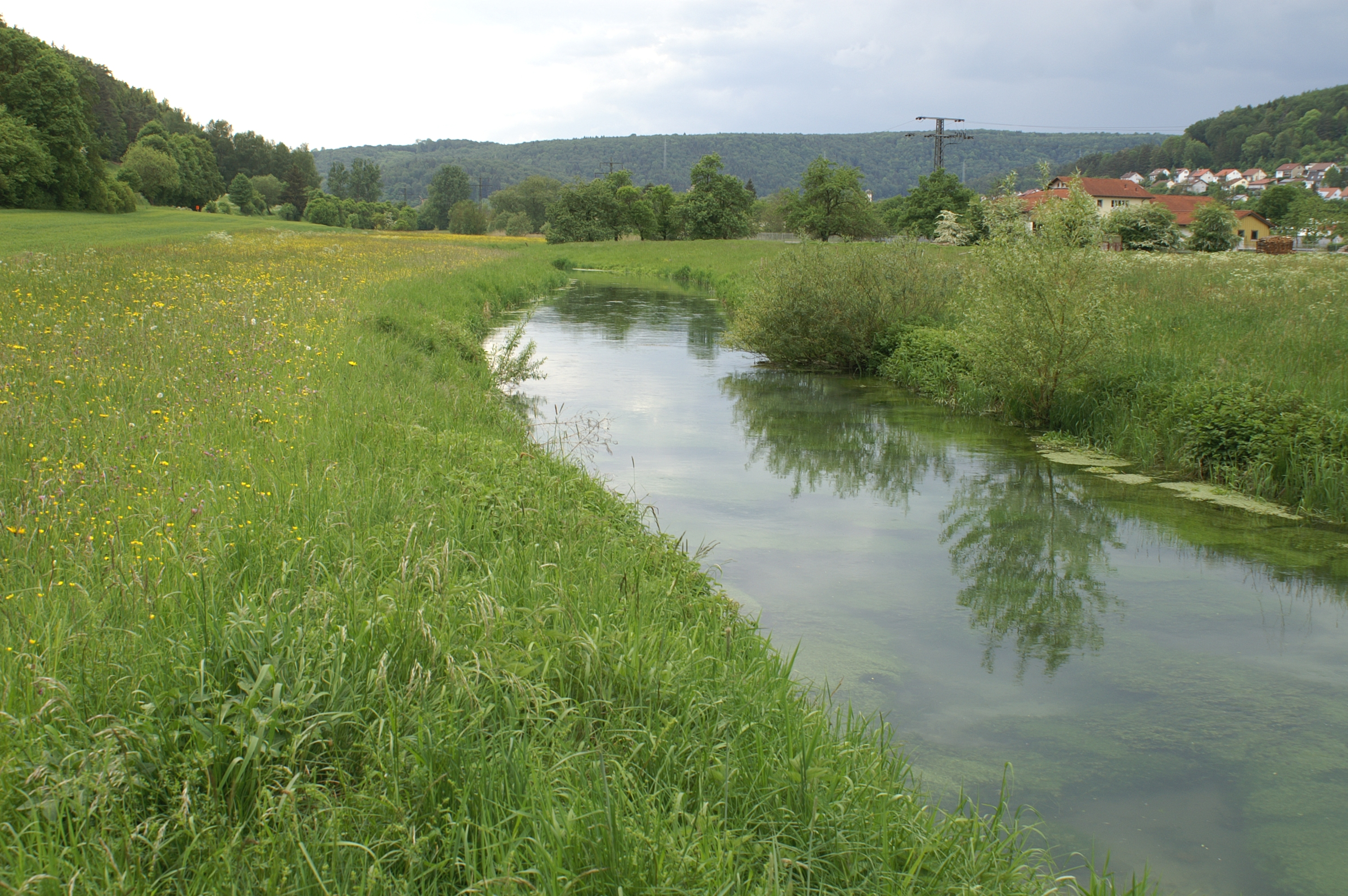 Das Achtal. Das Flüsschen wird vom Wasser von zwei großen Karst-Quelltöpfen gespeist. Das Tal ist eine schon von einer großen Urdonau verlassene Talschlinge bei Schelklingen im Alb-Donau-Kreis.